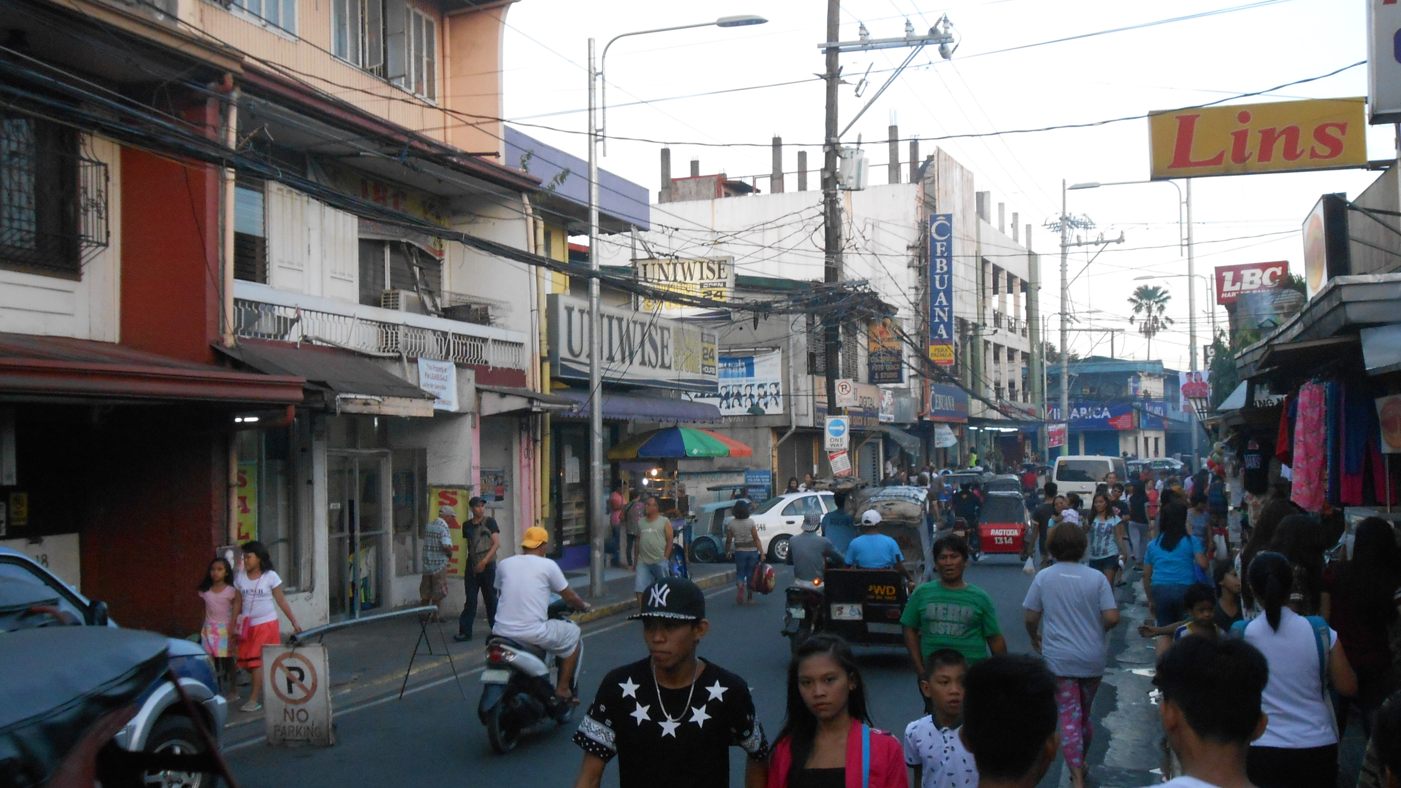 Pateros